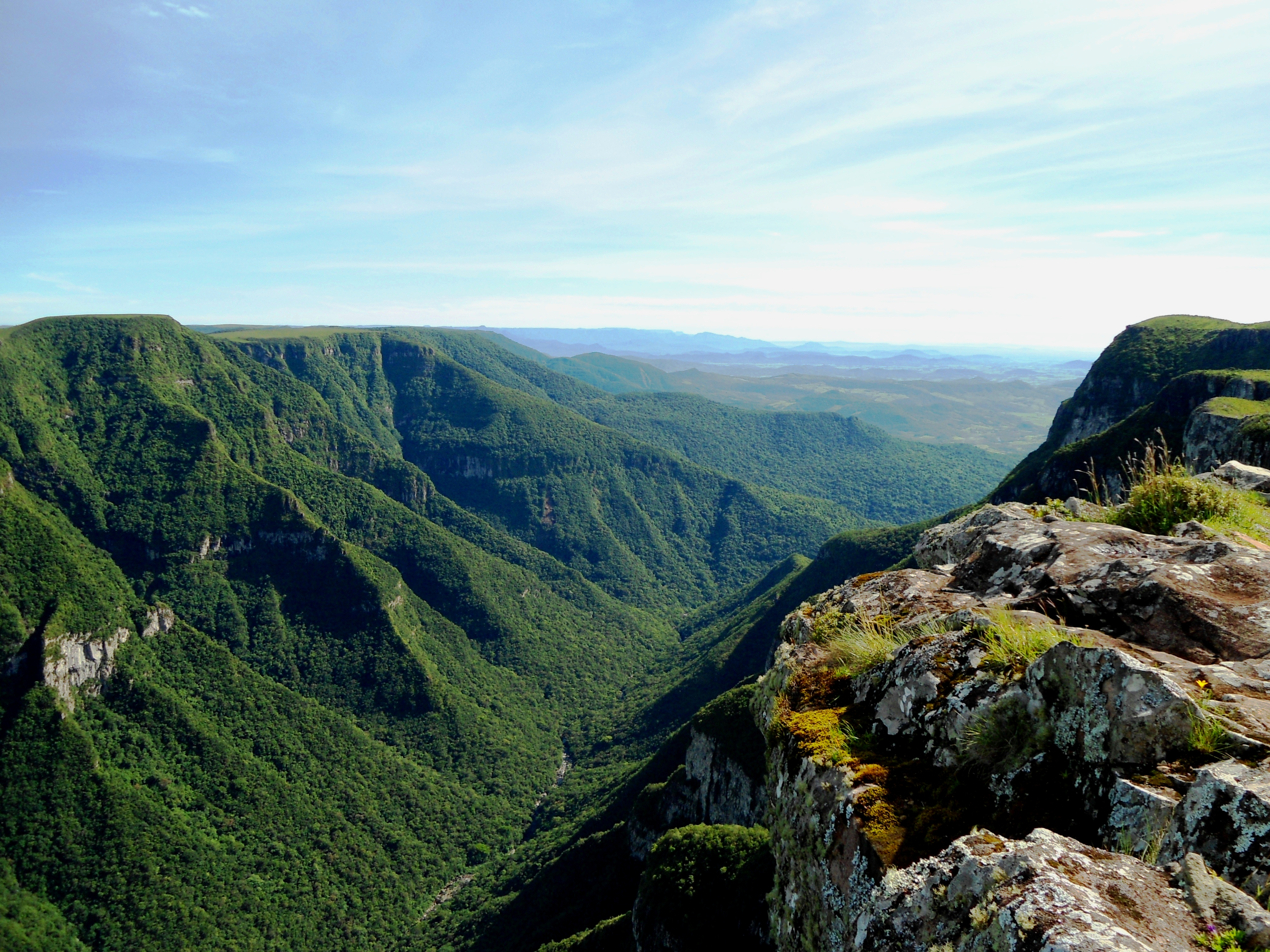 Vista do Cânion Fortaleza